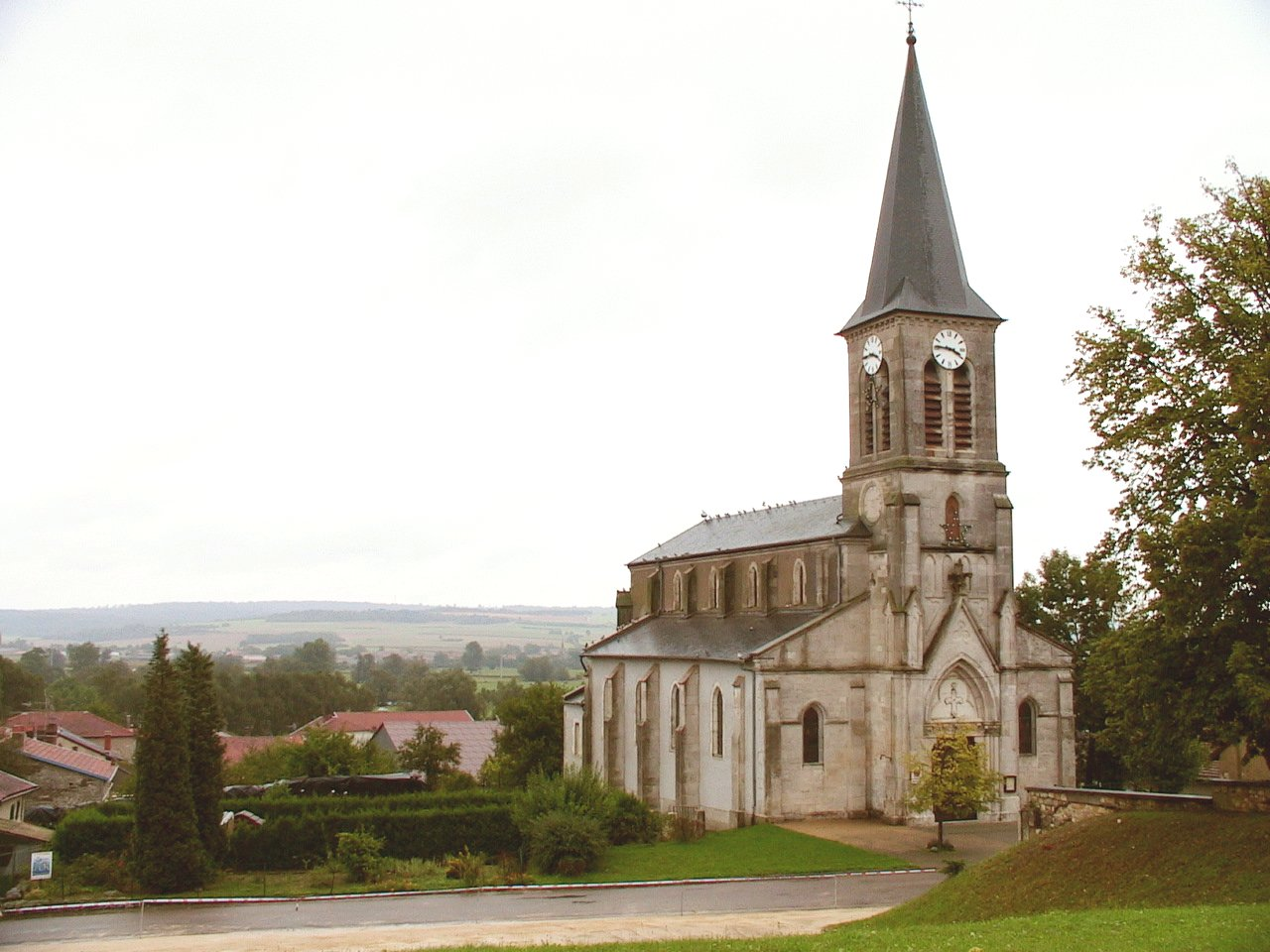 Village et église de Dompcevrin (Meuse)